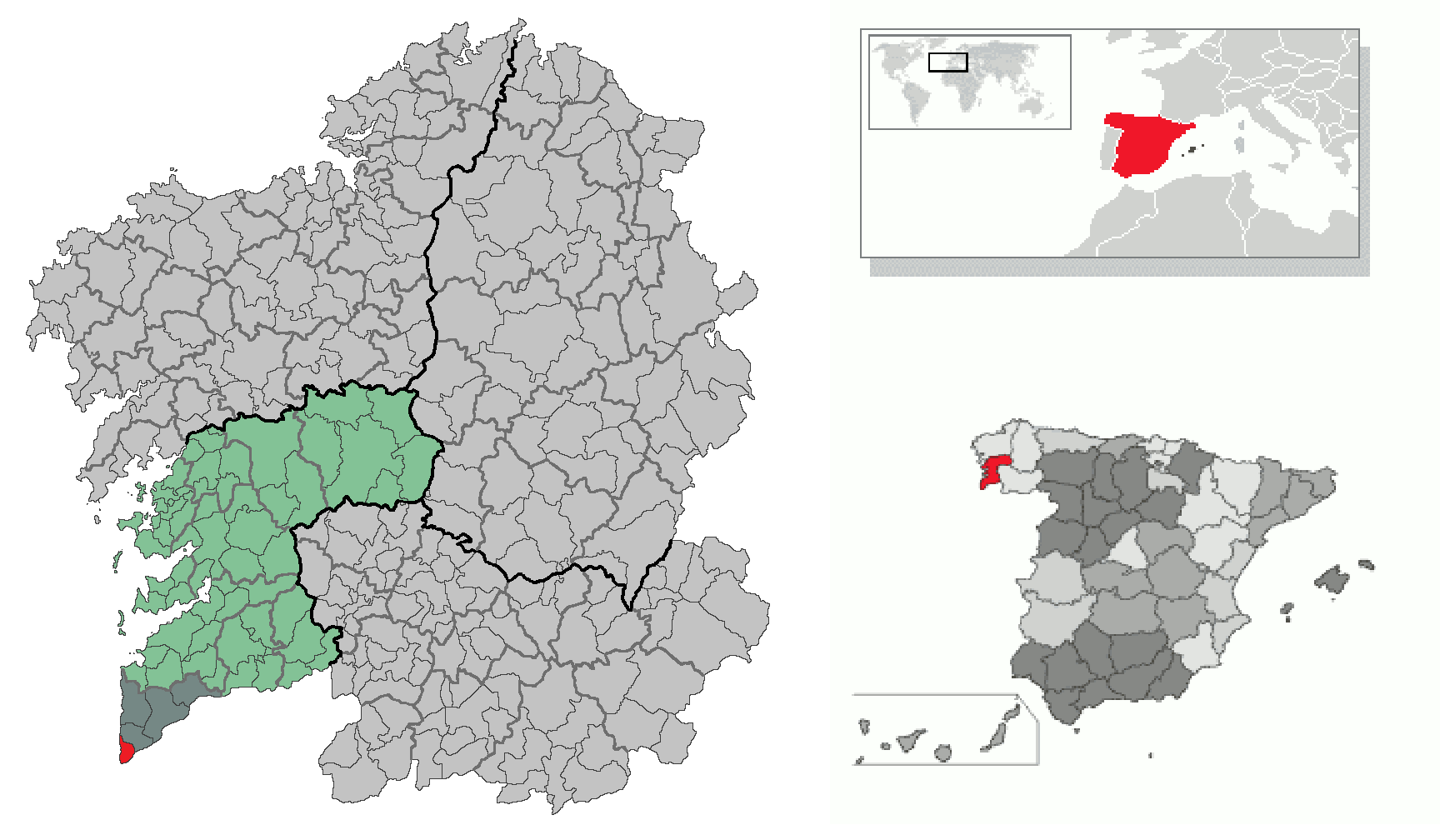 Municipio de A Guarda respecto a la provincia de Pontevedra, al país de España y al continente de Europa